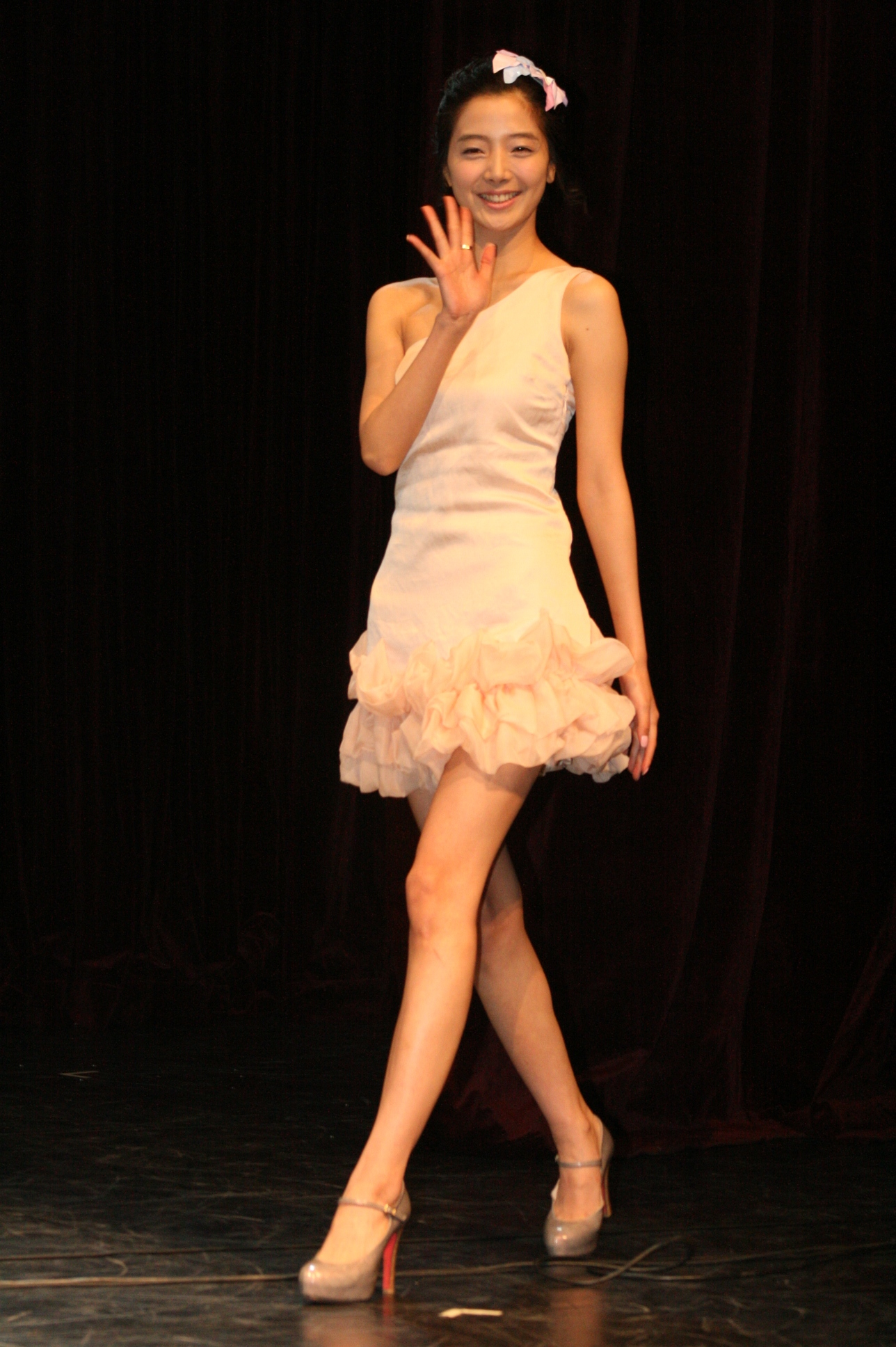 여고괴담5 시사회